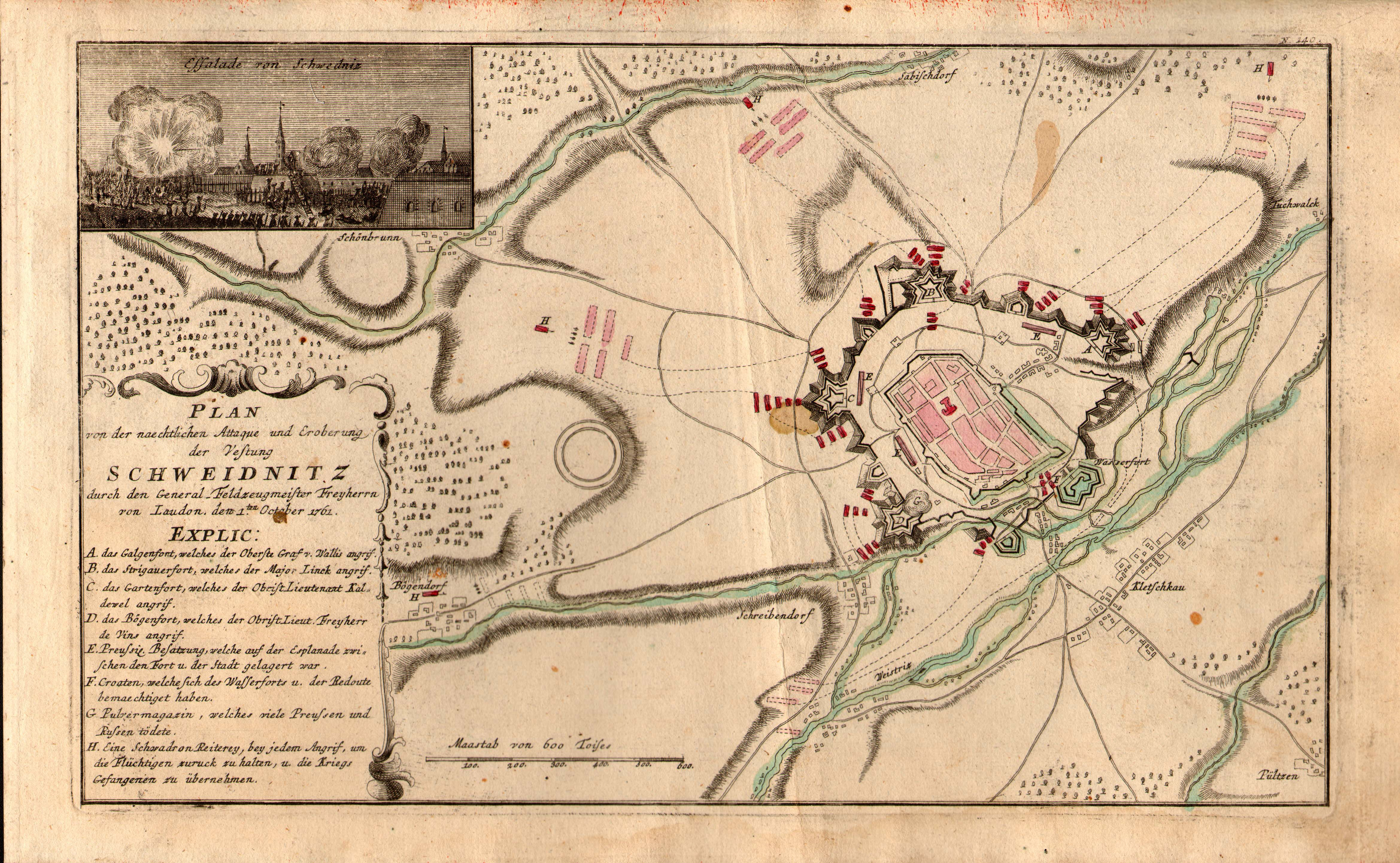 Karte zur Belagerung von Schweidnitz 1761